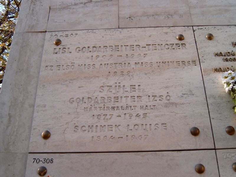 Lisl Goldarbeiter-Tenczer (1909-1997) Az első magyar Miss Universe, 1929. Farkasréti temető: Bürök-70-307. falsírbolt